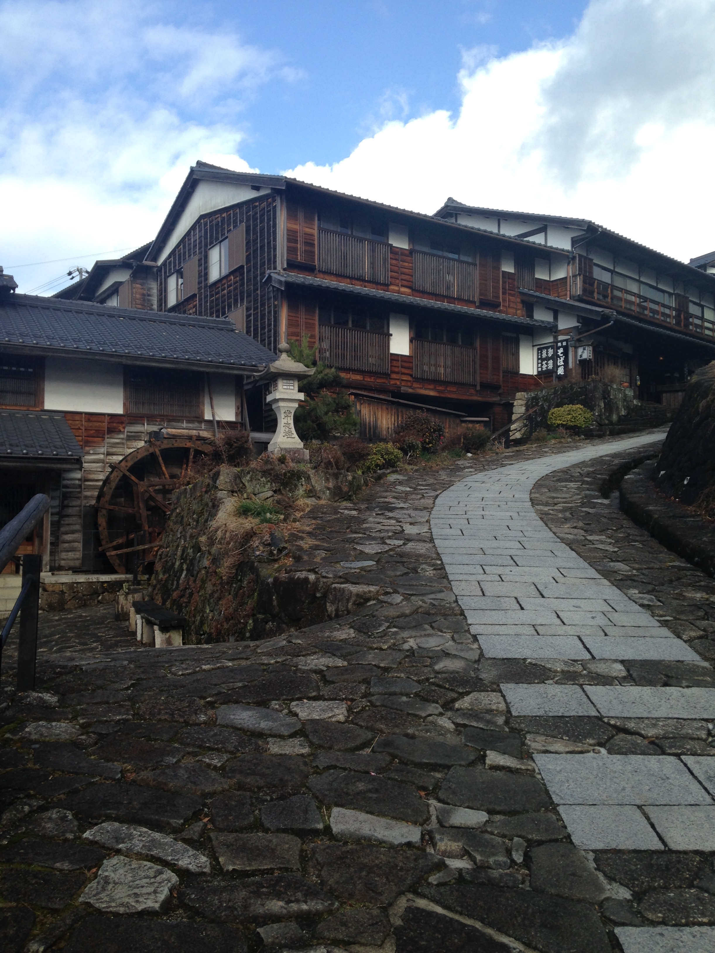 馬籠宿の枡形(南側)